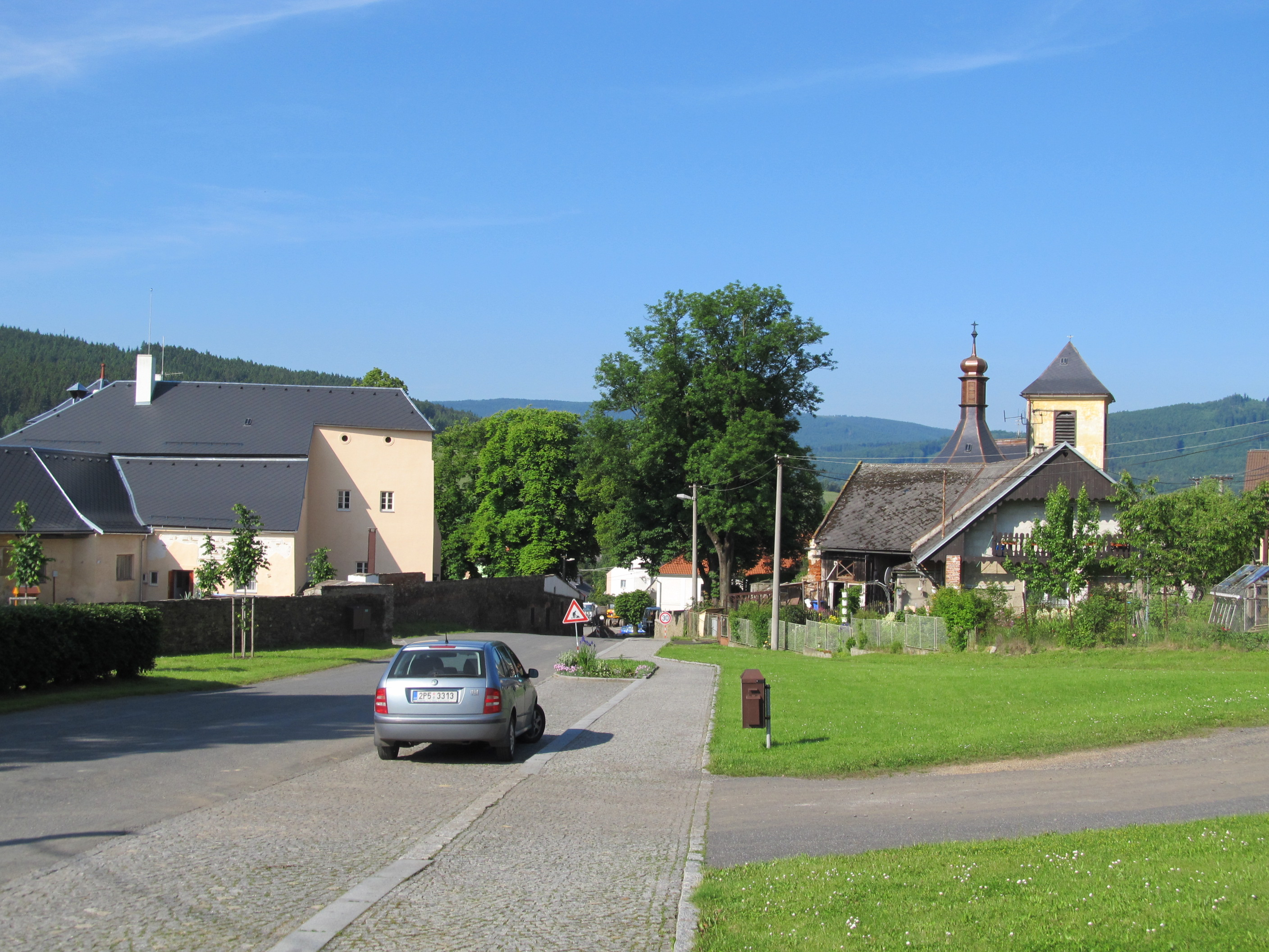 Dešenice - tvrz a kostel svatého Mikuláše